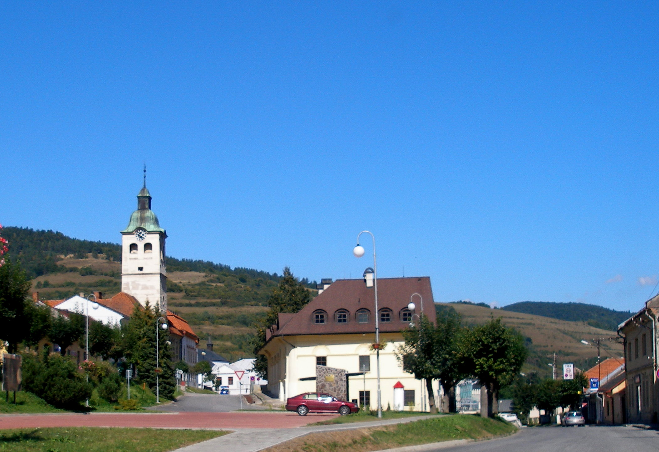 Okresné mesto Gelnica.